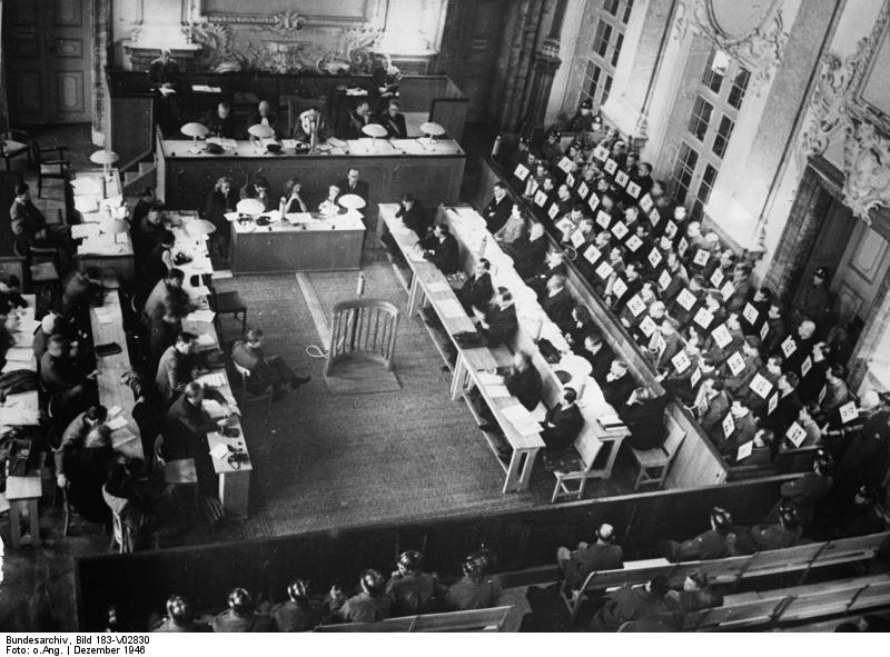 Rastatt, Kriegsverbrecherprozess Zentralbild-SNB Prozess in Rastatt gegen die deutschen faschistischen Kriegsverbrecher. In Rastatt, 12km von Baden-Baden begann im Dezember 1946 ein Prozess gegen die deutschen faschistischen Kriegsverbrecher. Sie hatten sich vor einem französischen Tribunal zu verantworten. Auf der Anklagebank saßen 550 faschistische Henker, die den Tod von 25000 Menschen verschuldet hatten. Als Zeugen traten in dem Prozeß ehemalige Häftlinge der Konzentrationslager Auschwitz und Dachau auf. U.B.z.: Blick in den Gerichtssaal im Schloss Rastatt während der Eröffnung der Verhandlungen. Hinten: der Gerichtshof, links: die Journalisten, rechts: die Angeklagten mit ihren deutschen Verteidigern; vorn: das Publikum 5050-50